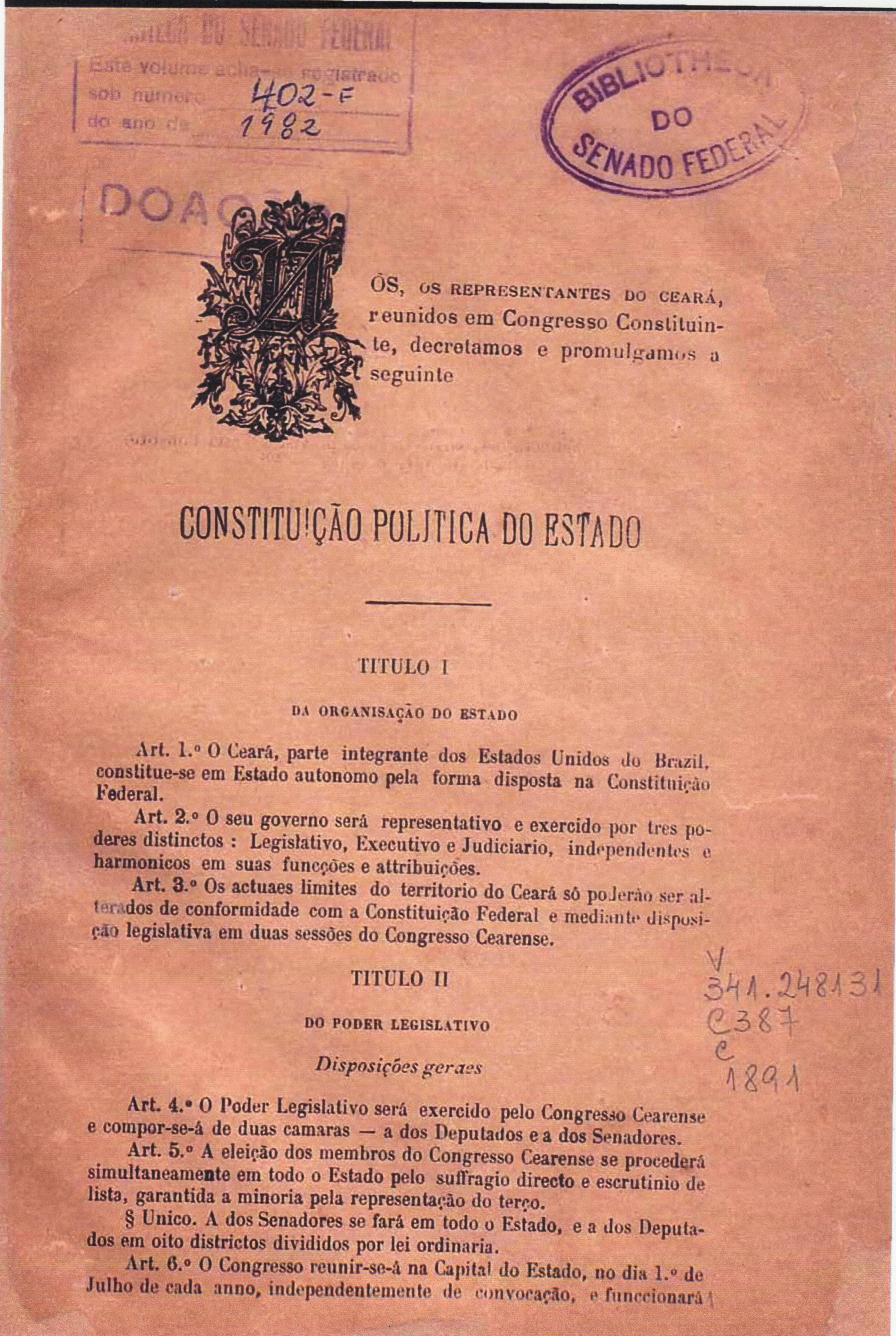 Preâmbulo da Constituição Política do Estado do Ceará de 1891